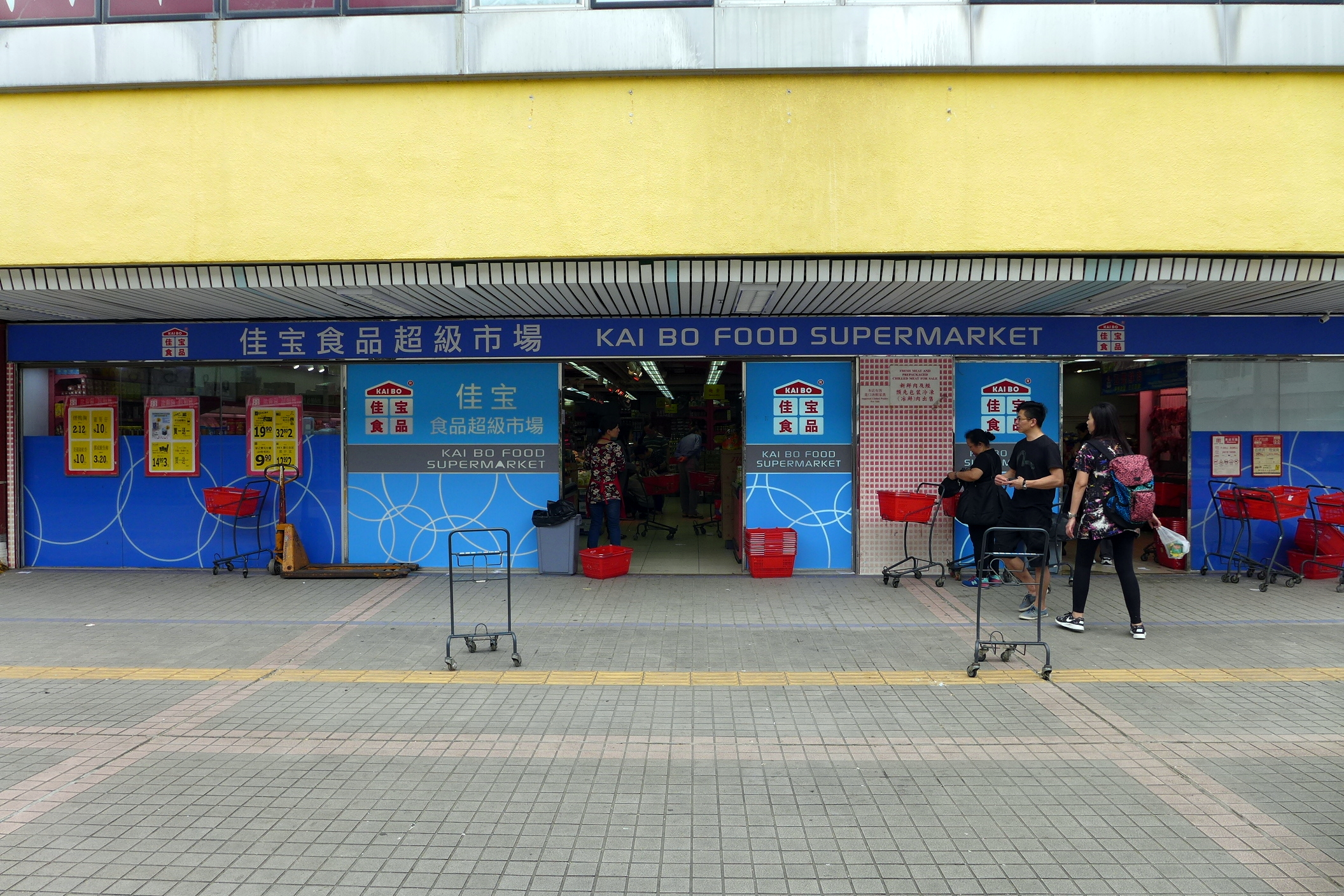 Kai Bo Food Supermarket in Lek Yuen Estate